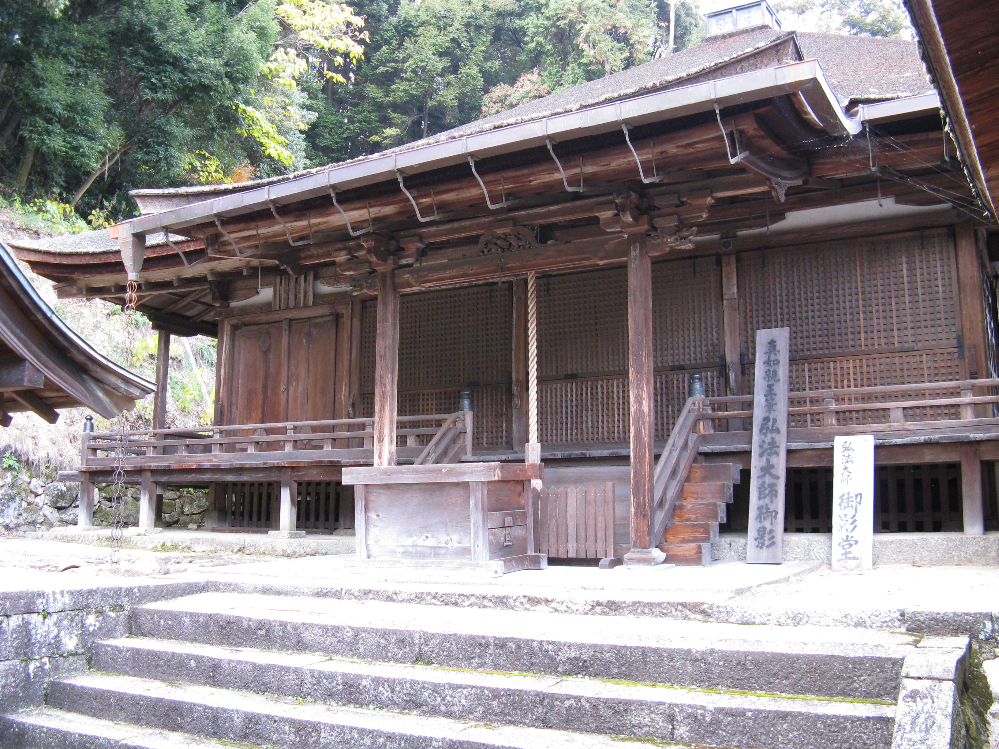 金剛寺 御影堂